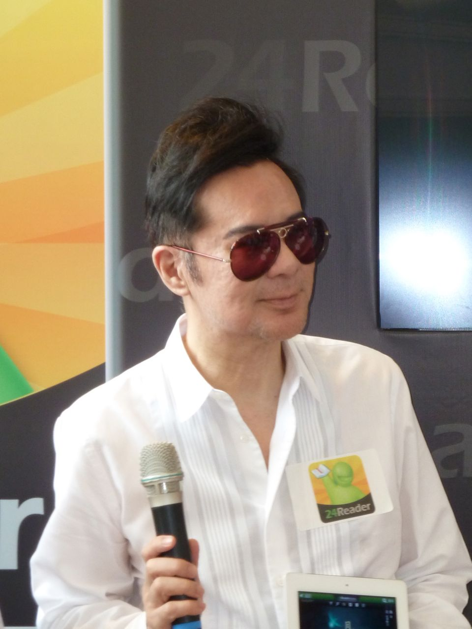 Kam Kwok-leung (甘國亮) at Hong Kong book fair